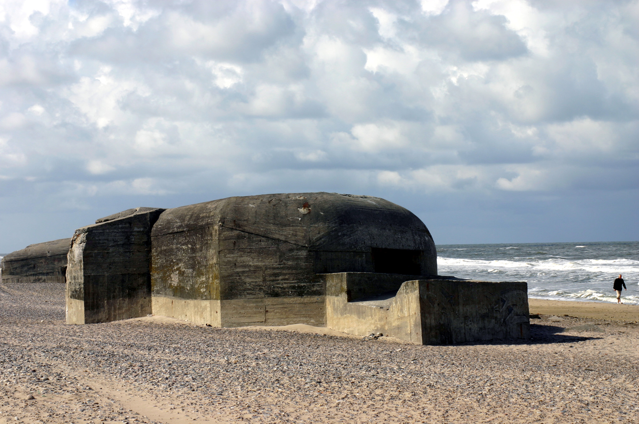 Søndervig, Denmark, German bunker at the beach